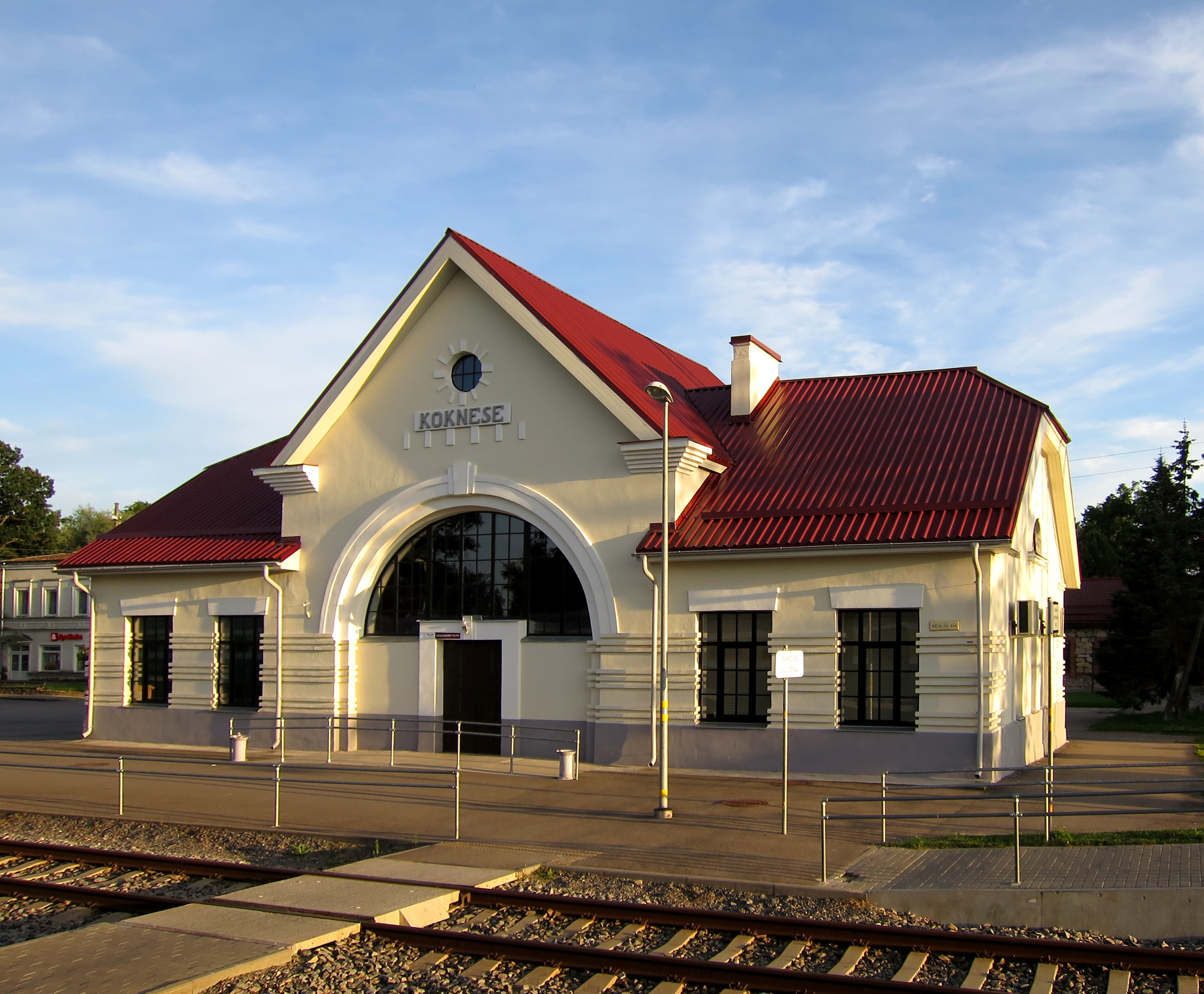 Kokneses stacijas ēka